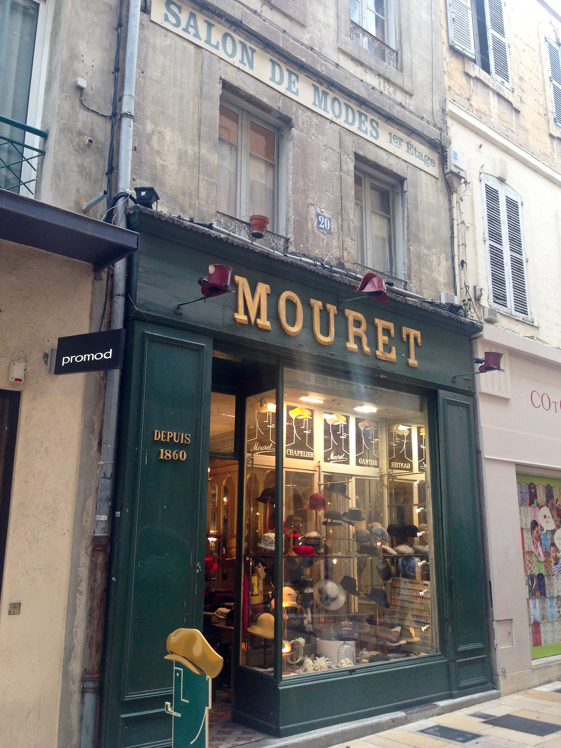 La chapellerie Mouret, 20 rue des marchands en Avignon, comporte un décor Louis XVI d'origine (1860). Son décor intérieur et sa façade sont classés "Monuments Historiques" depuis 1995.